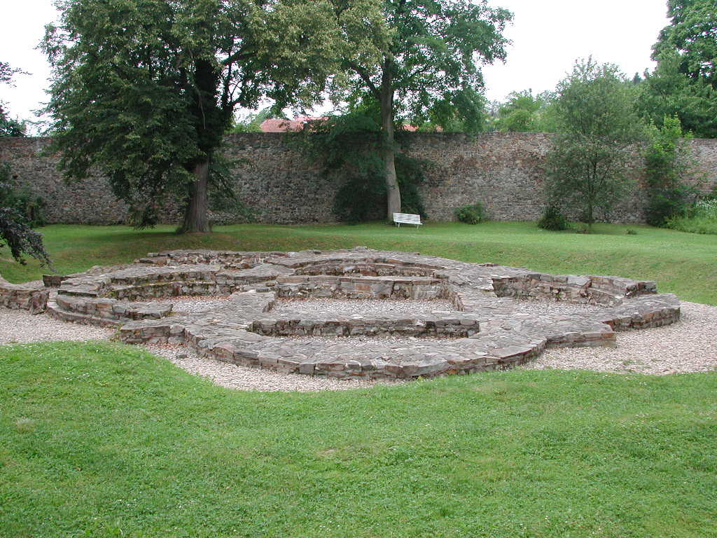 Česky: Sázavský klášter (základy kaple)